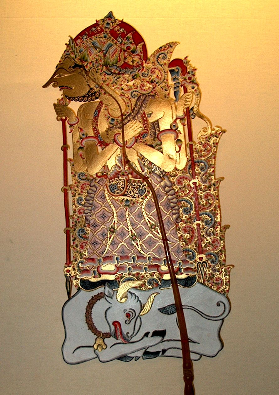 batara guru kuwi dewa kahyangan